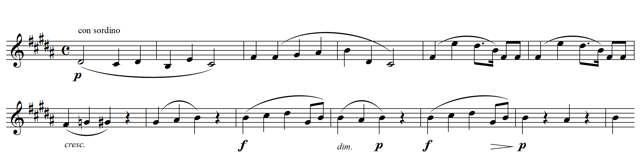 Notenbeispiel zum Hauptthema 2. Satz des Klavierkonzerts Nr. 5 von Beethoven